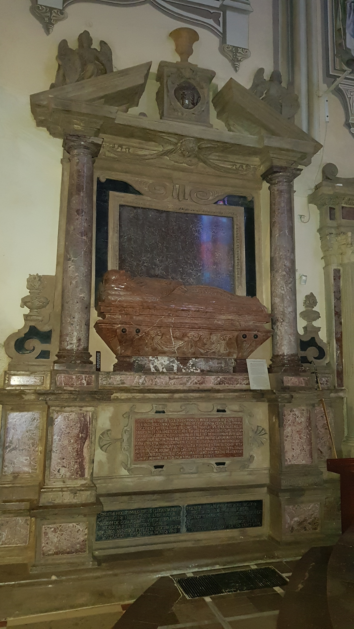 Nagrobek Jadwigi z Włodków Firlejowej herbu Prawdzic w prezbiterium kościoła franciszkanów w Krośnie